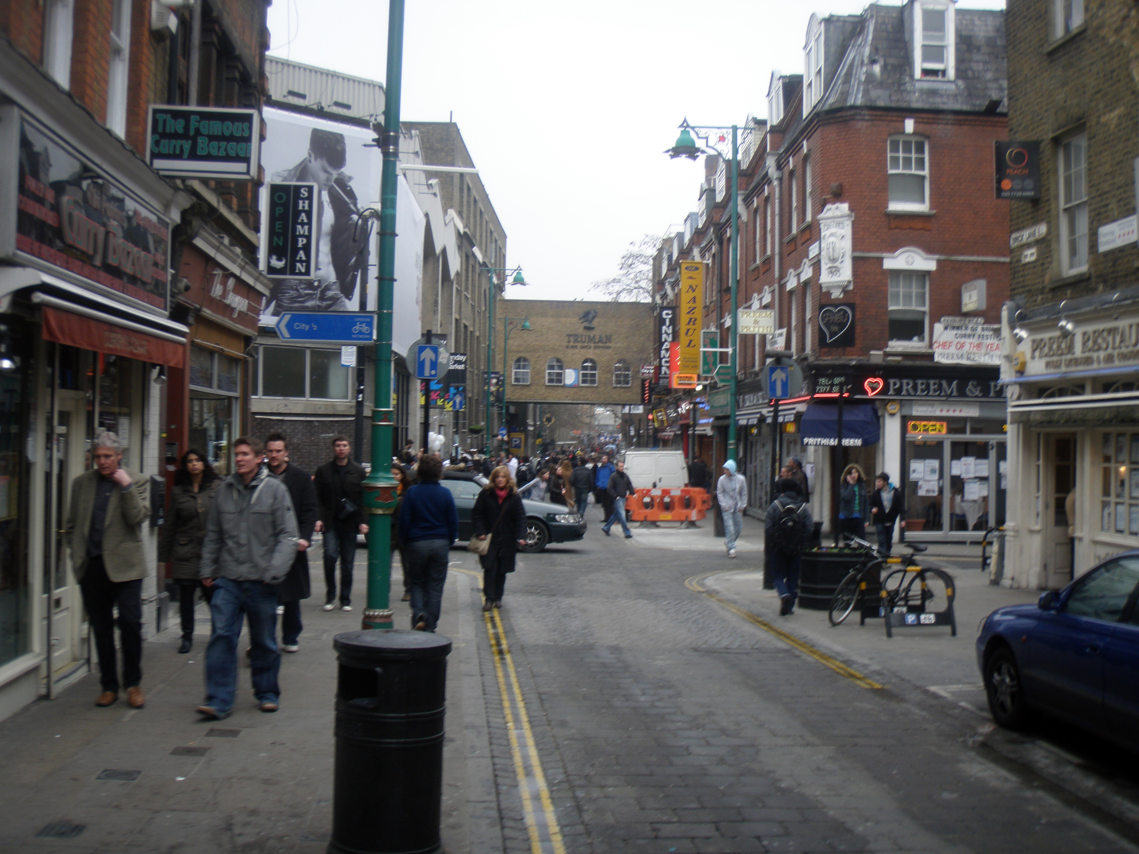 Panorámica de la calle Brick Lane, en Londres, Reino Unido